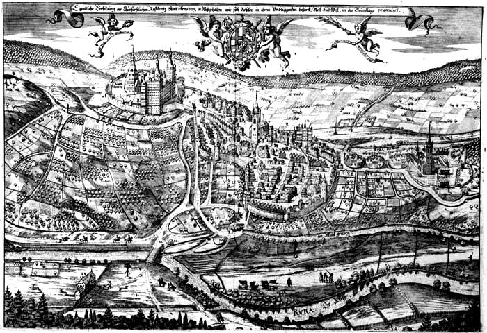 Historische Darstellung Stadt Arnsberg von 1669 (Maler Metzger)